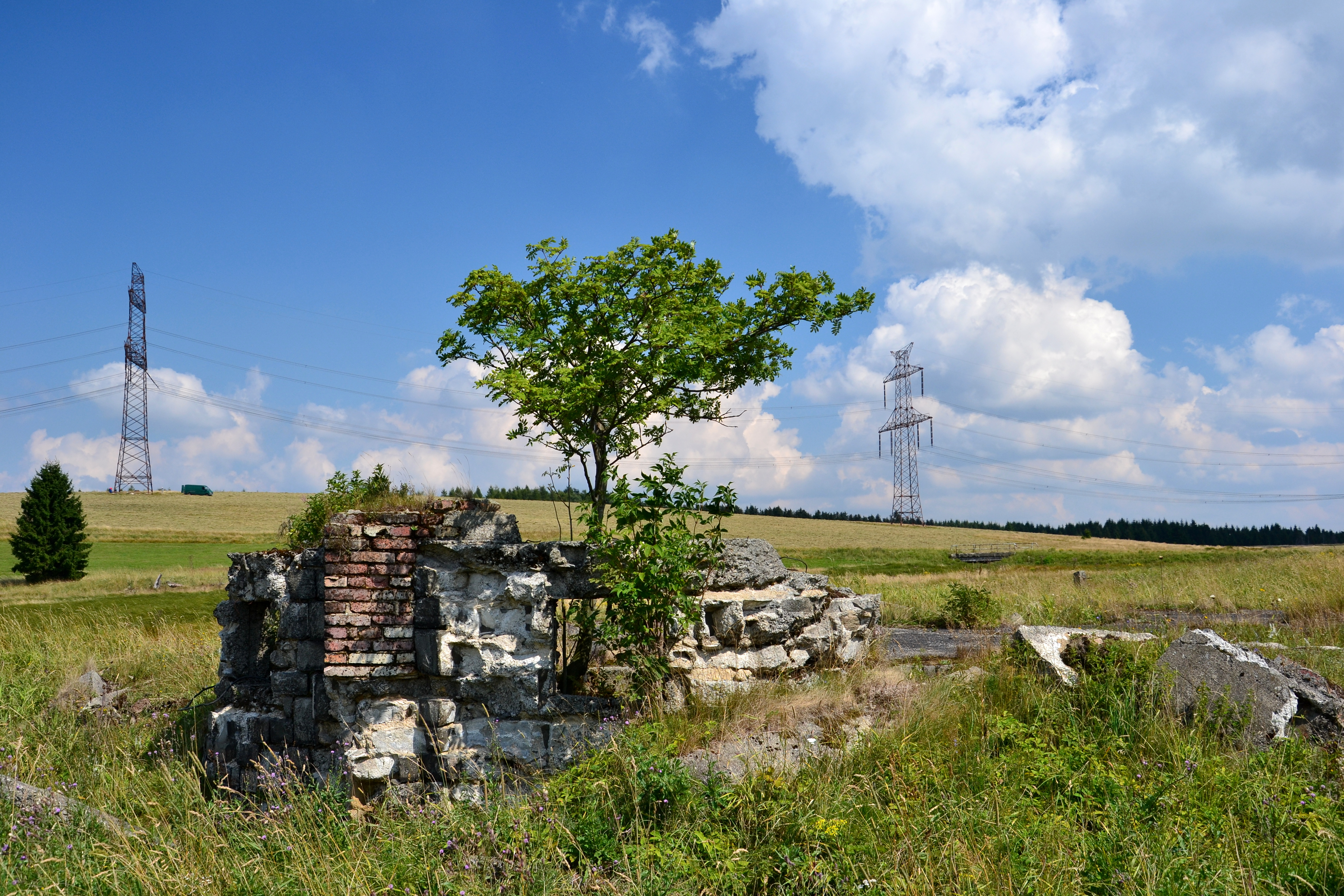 JIlmová - základy domu